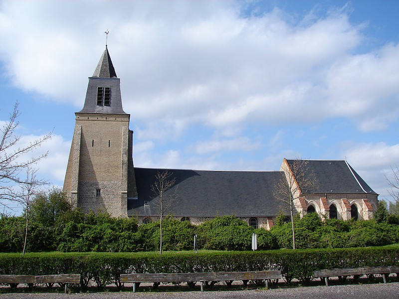 Eglise Saint Jean Baptiste Berck